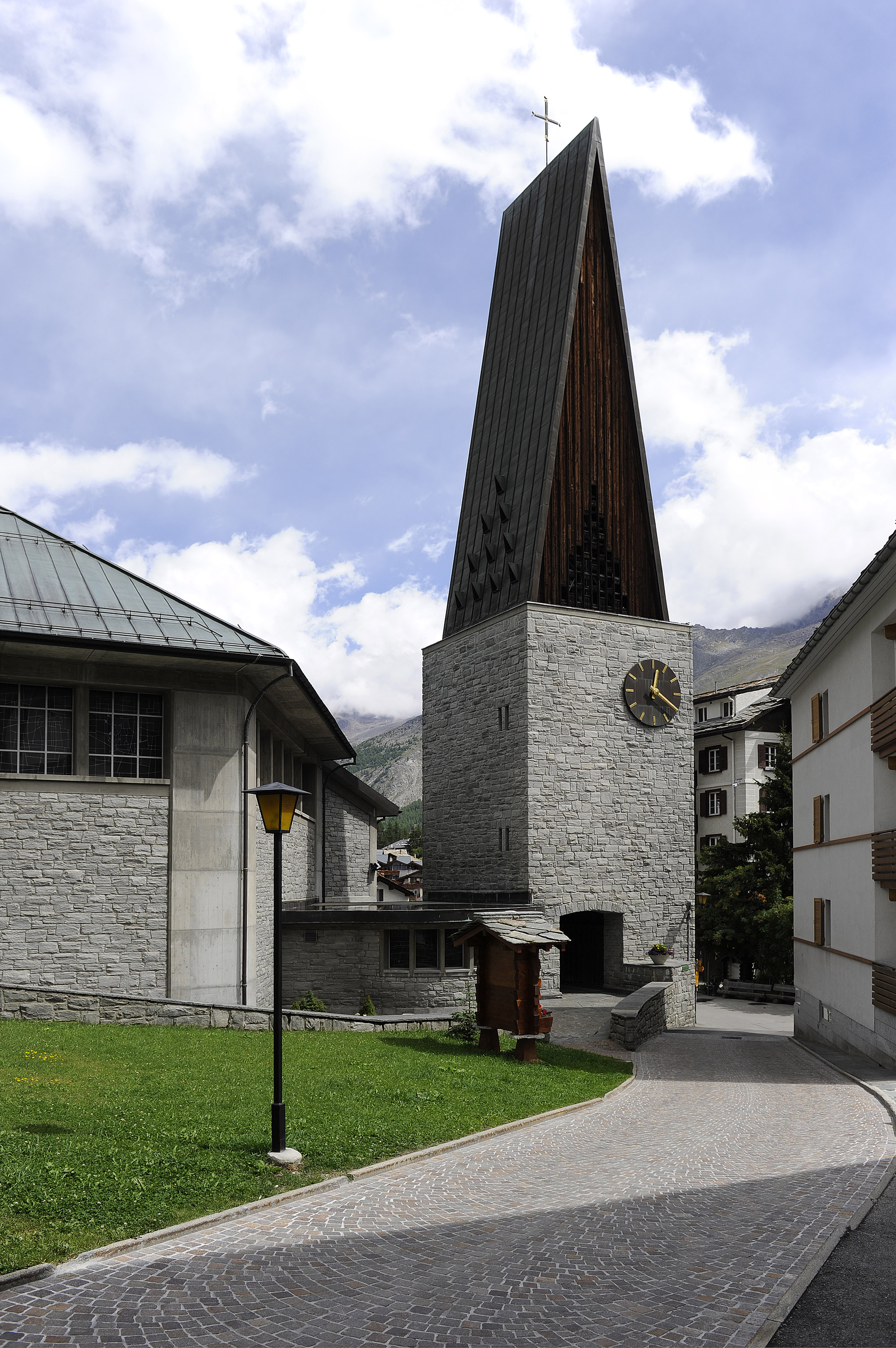 Blick auf die Herz-Jesu-Kirche im Ortskern von Saas-Fee, August 2011